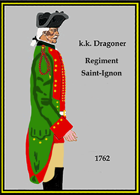 Österreichishes Dragoner-Regiment „Saint-Ignon“ 1762 (Aus: L.& F. Funcken - „L'Uniforme et les Armes des soldats de la guerre en dentelle II“) Castermann (Tournai 1976)